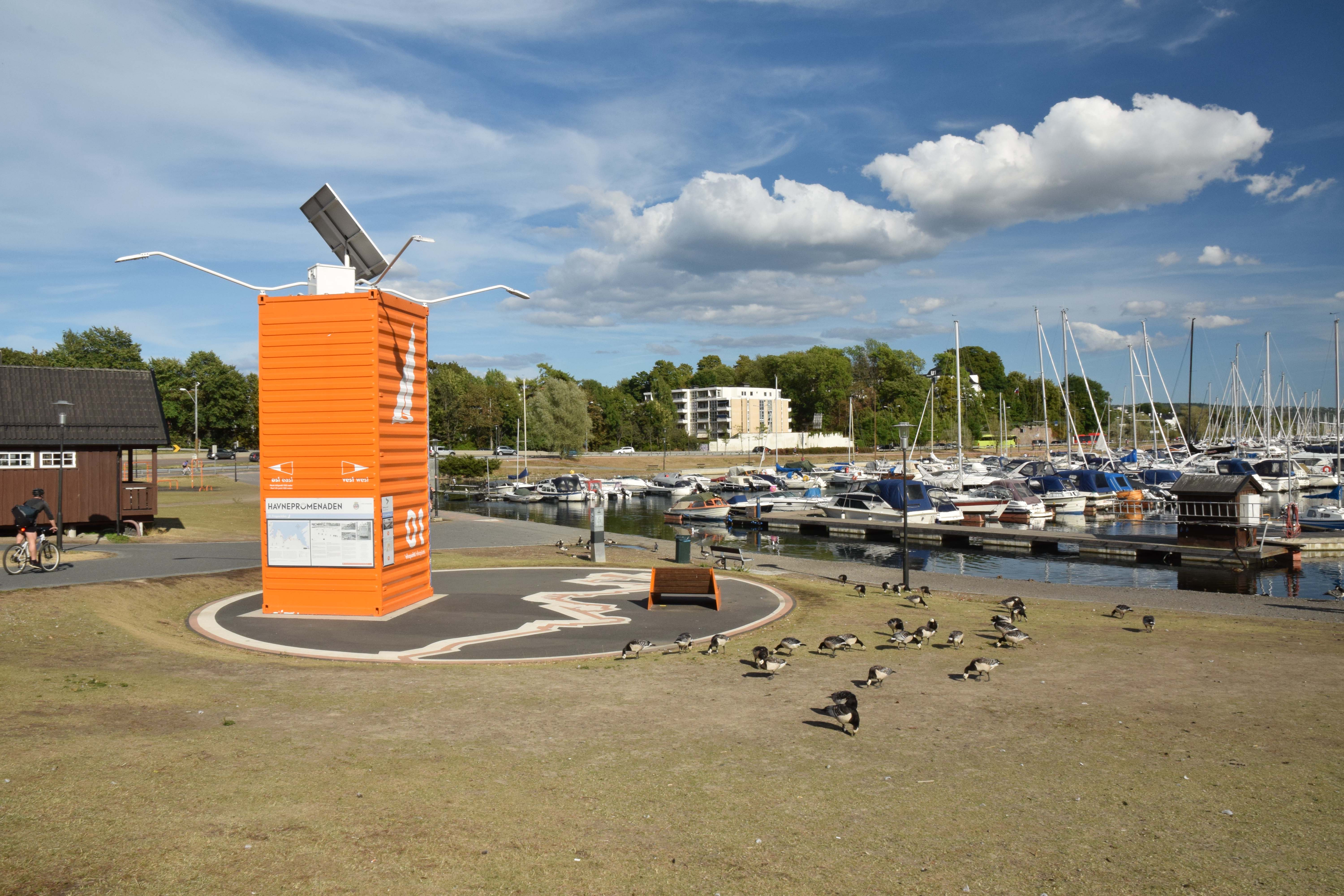 Bunnen av Frognerkilen med infotårn 1 til Havnepromenaden